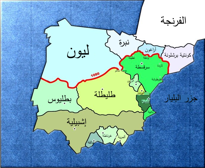 خارطة تُظهرُ أقصى حدود الطوائف الأندلسيَّة زمن المقتدر في سنة 1076م خارطة طائفة سرقسطة ترجع لحوالي عام 1080م.